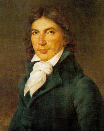 commandé par Louis-Philippe pour le musée historique de Versailles en 1835